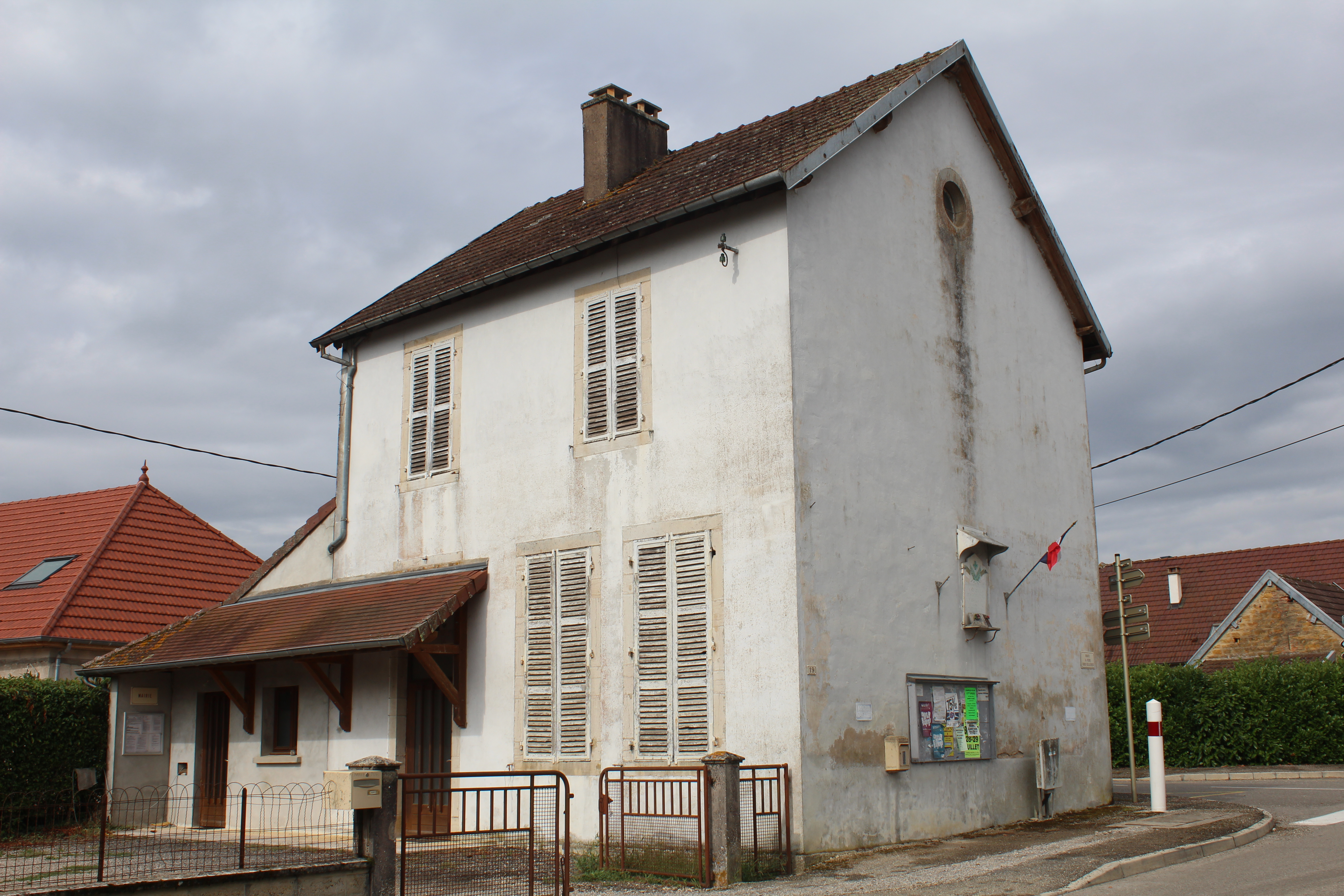 Mairie de Francheville, Jura.